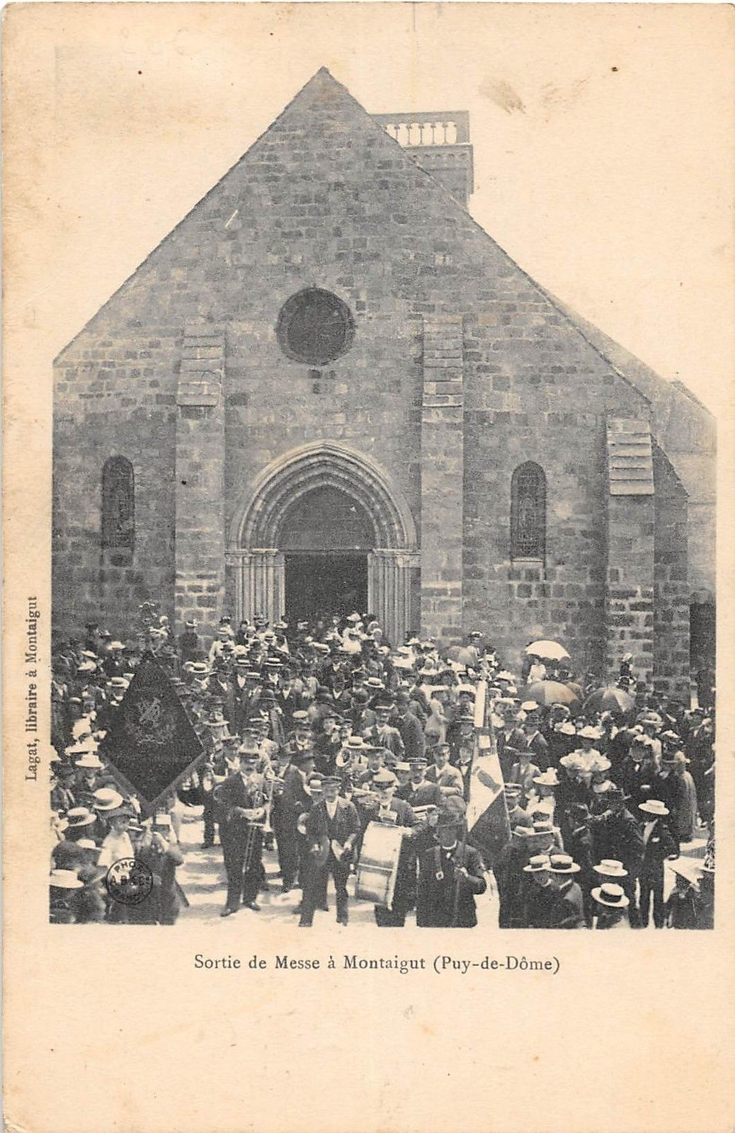 Sortie de messe à Montaigut vers 1910, avec la fanfare.